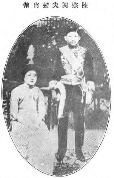 治家全書圖像